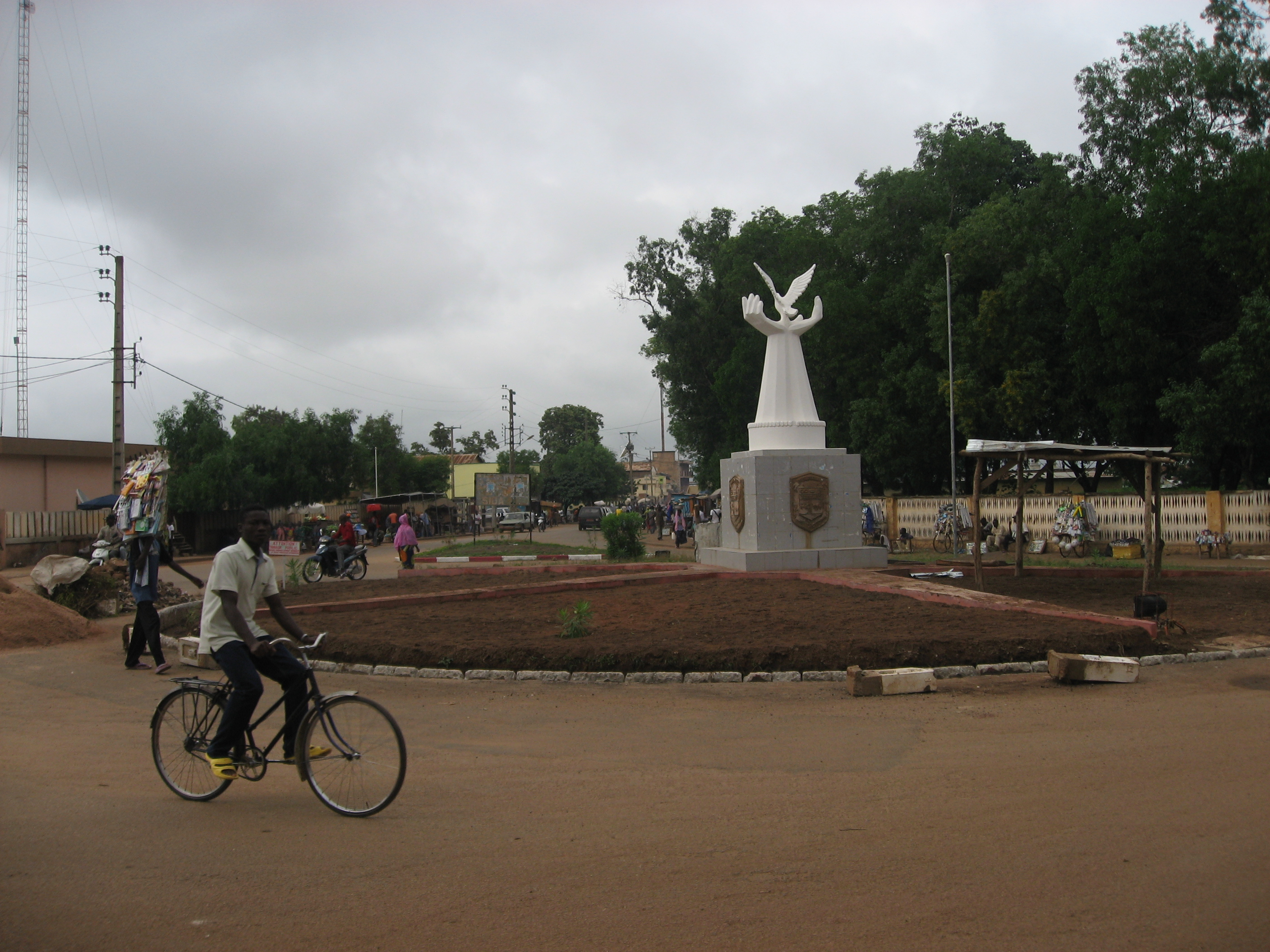 Parakou, Benin